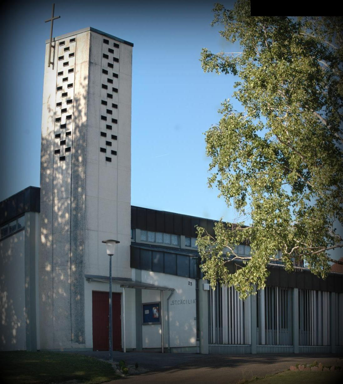 Katolische Kirche in Reichartshausen